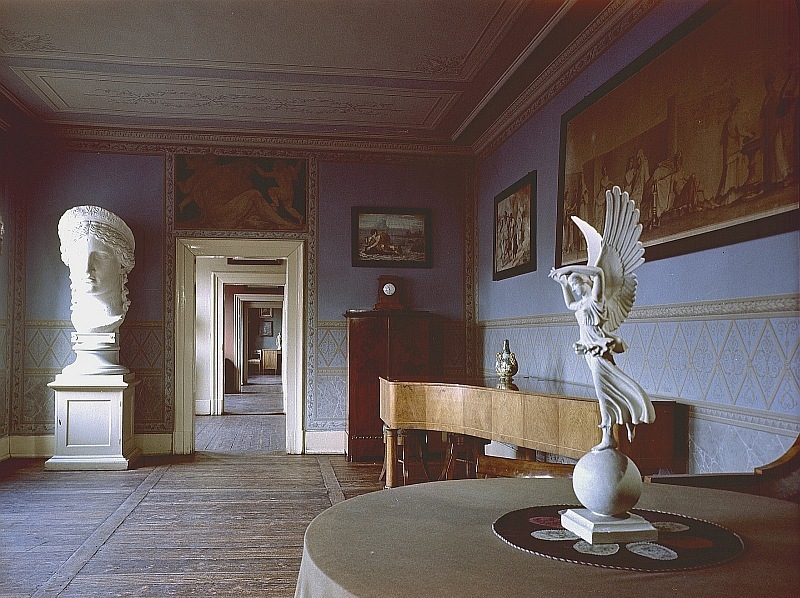 Original image description from the Deutsche Fotothek Weimar. Goethes Wohnhaus, Junozimmer